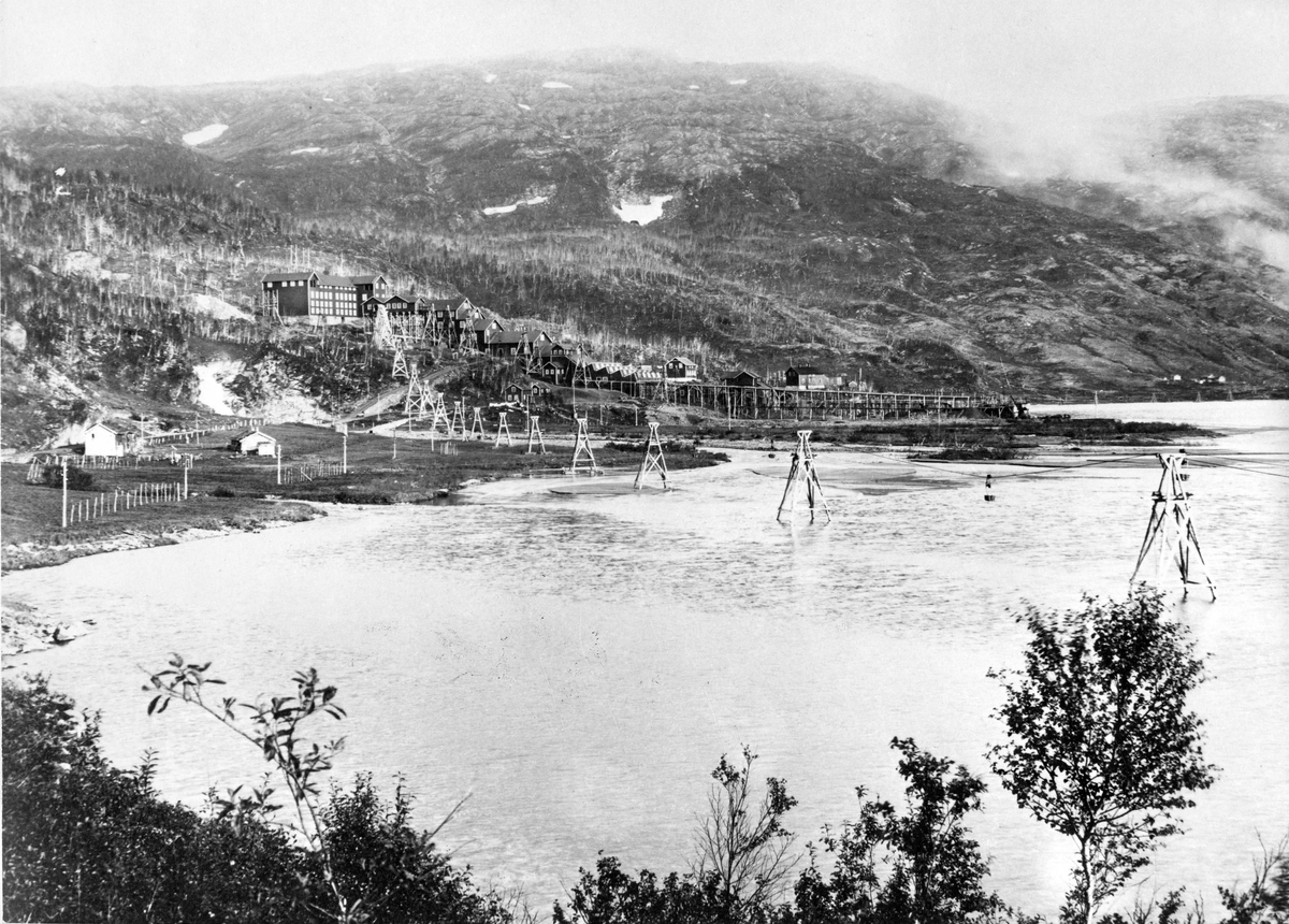 Sandnes industriområde. Skjeiderhus Vaskeri Linbane 1902 - 1905 SG.F.10009-0671